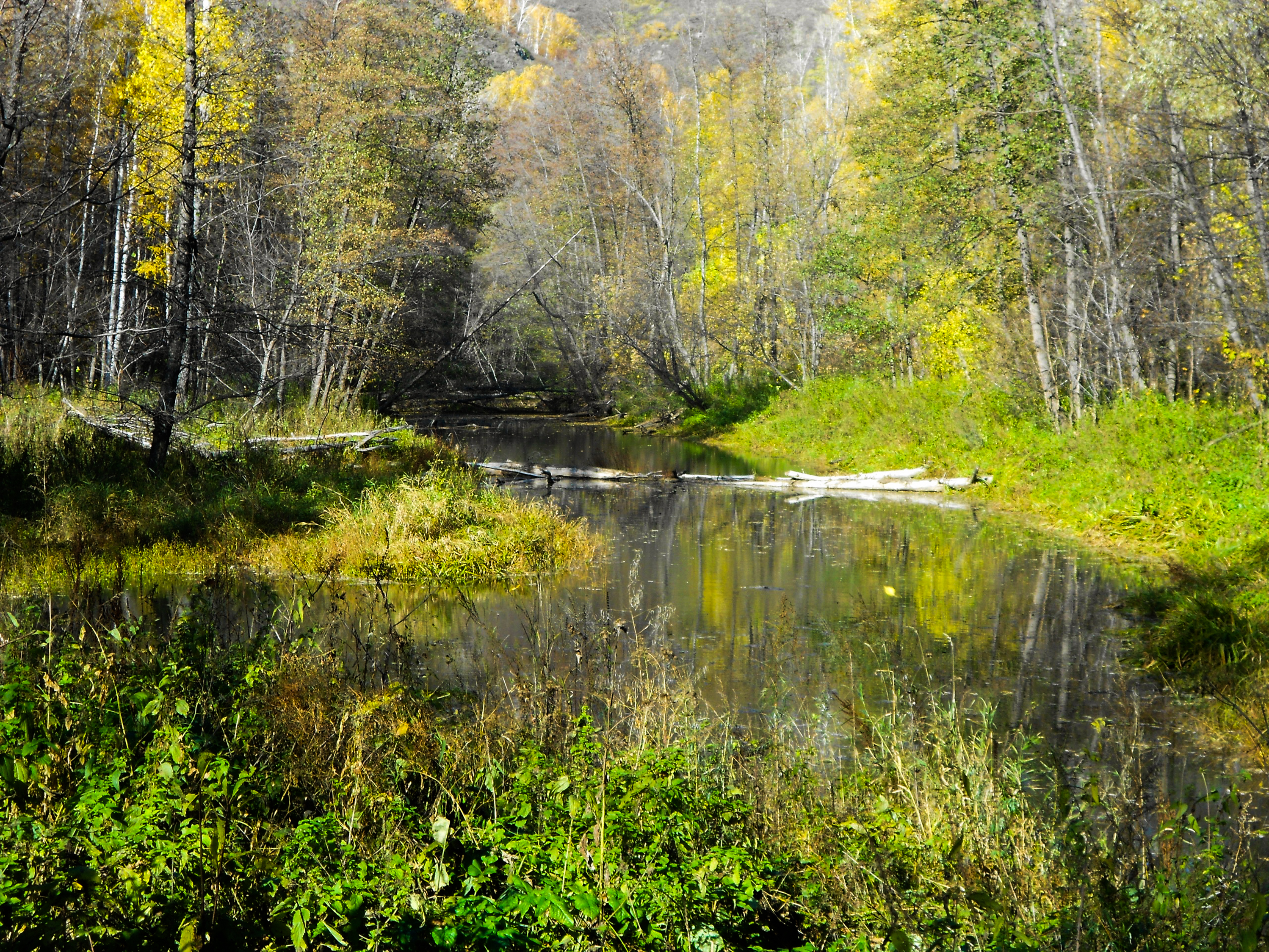 Шайтантау заказник, Хайбуллинский район This image is related to the protected area of Russia number 0210231